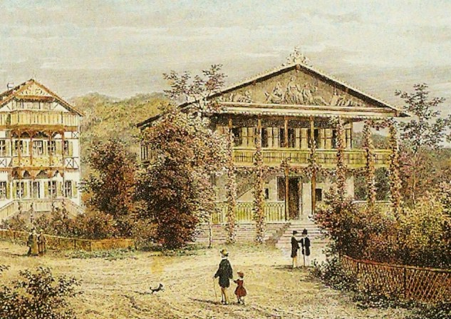 Königliches Kurtheater in Bad Kissingen, erbaut 1856 in Schweizerhausstil; kolorierter Stahlstich